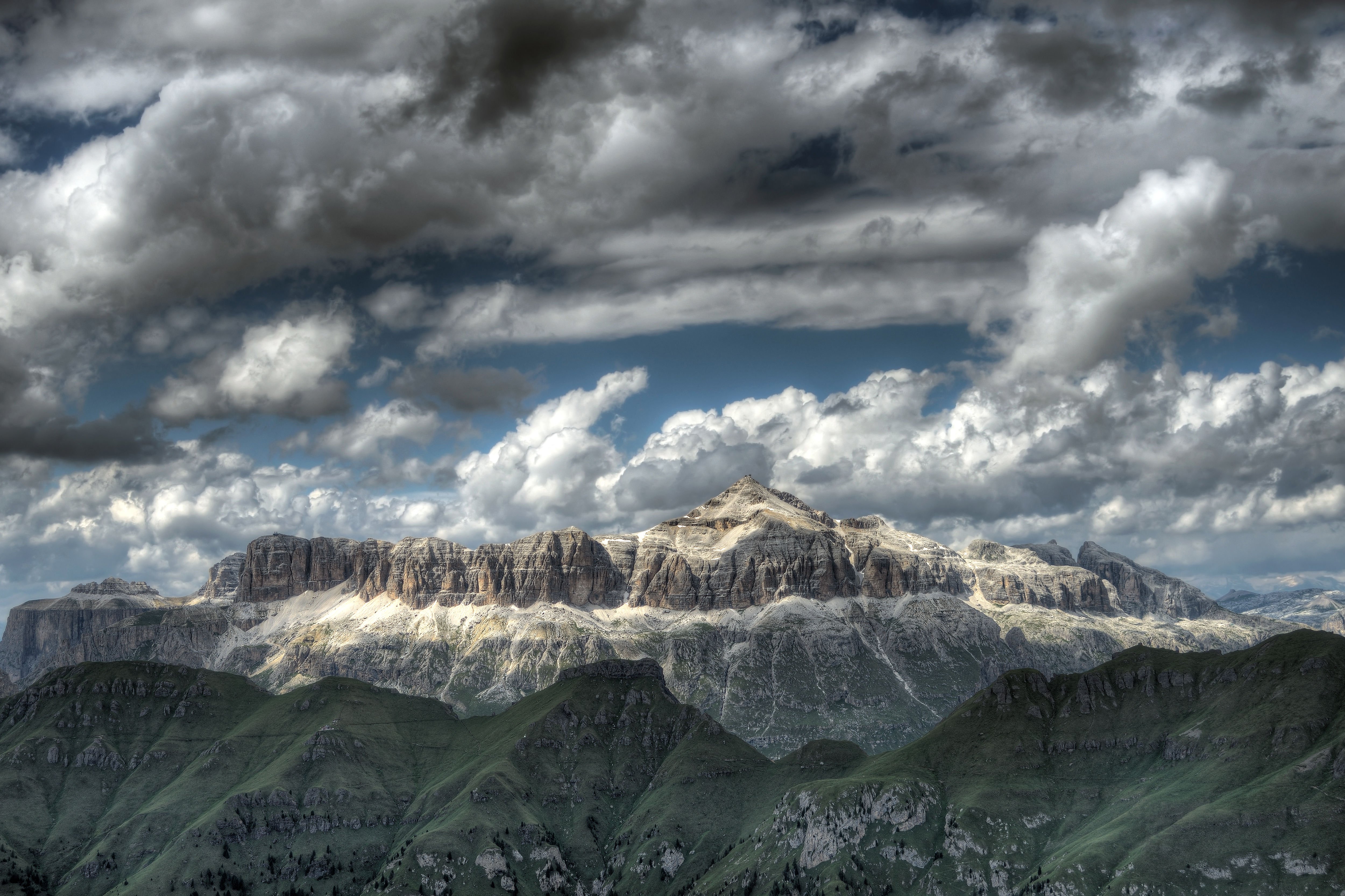 Il Gruppo Sella da Pian dei Fiacconi, Canazei, Trento, Italia